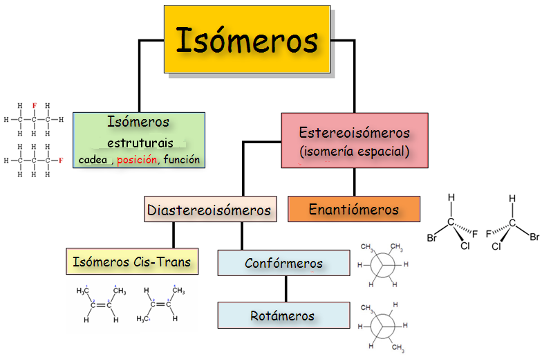 == Clasificación de los isómeros en Química orgánica: * Estructurales: ** de cadena, ** de posición y ** de función. * Estereoisómeros: **enantiómeros y **diastereoisómeros: confórmeros (rotámeros) e isómeros cis-trans